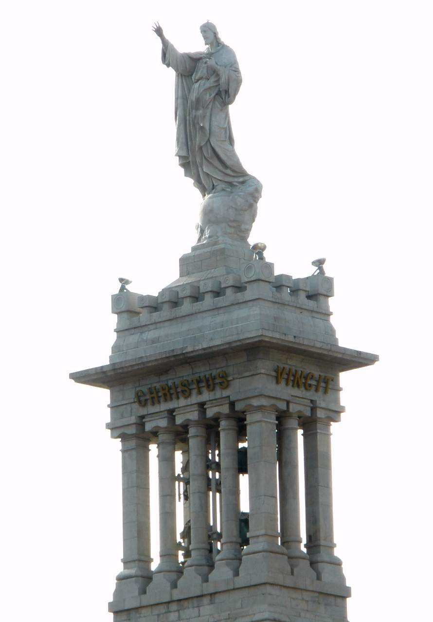 lica del Sagrado Corazón de Jesús (Gijón, Asturias)